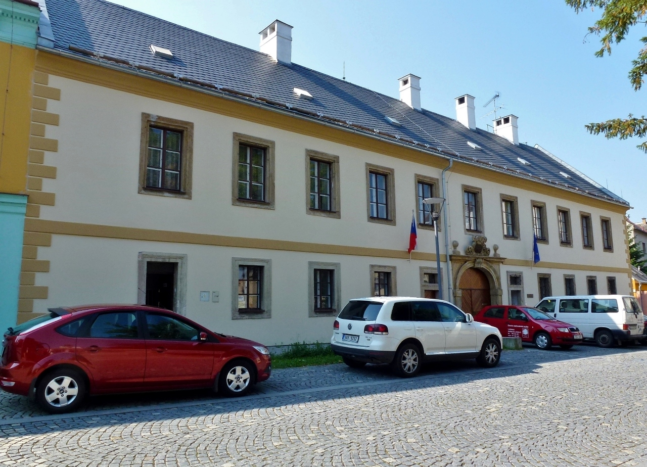 Děkanství (Lanškroun), nám. Aloise Jiráska 2, Lanškroun